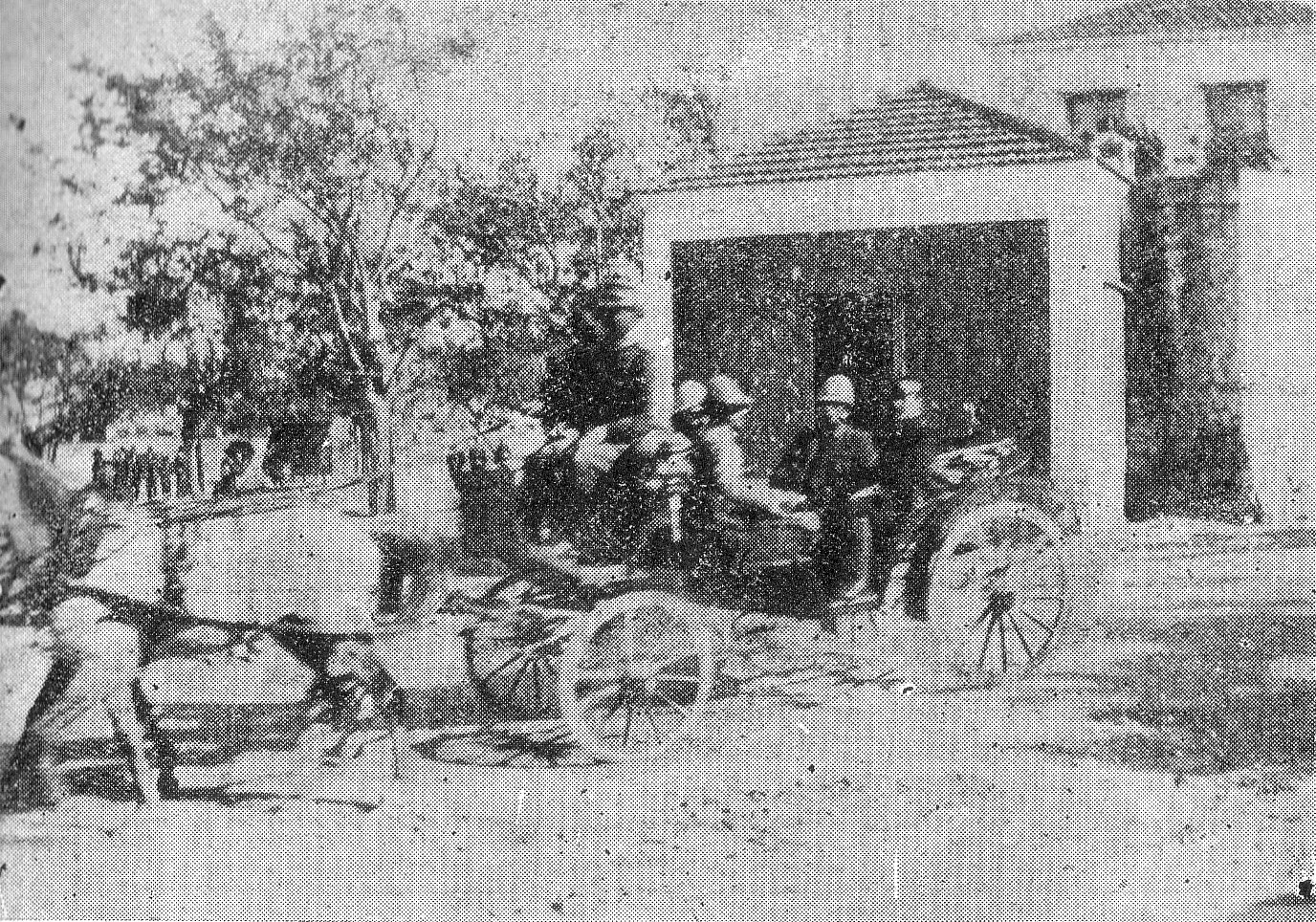 Ingresso del generale Ameglio a Rodi